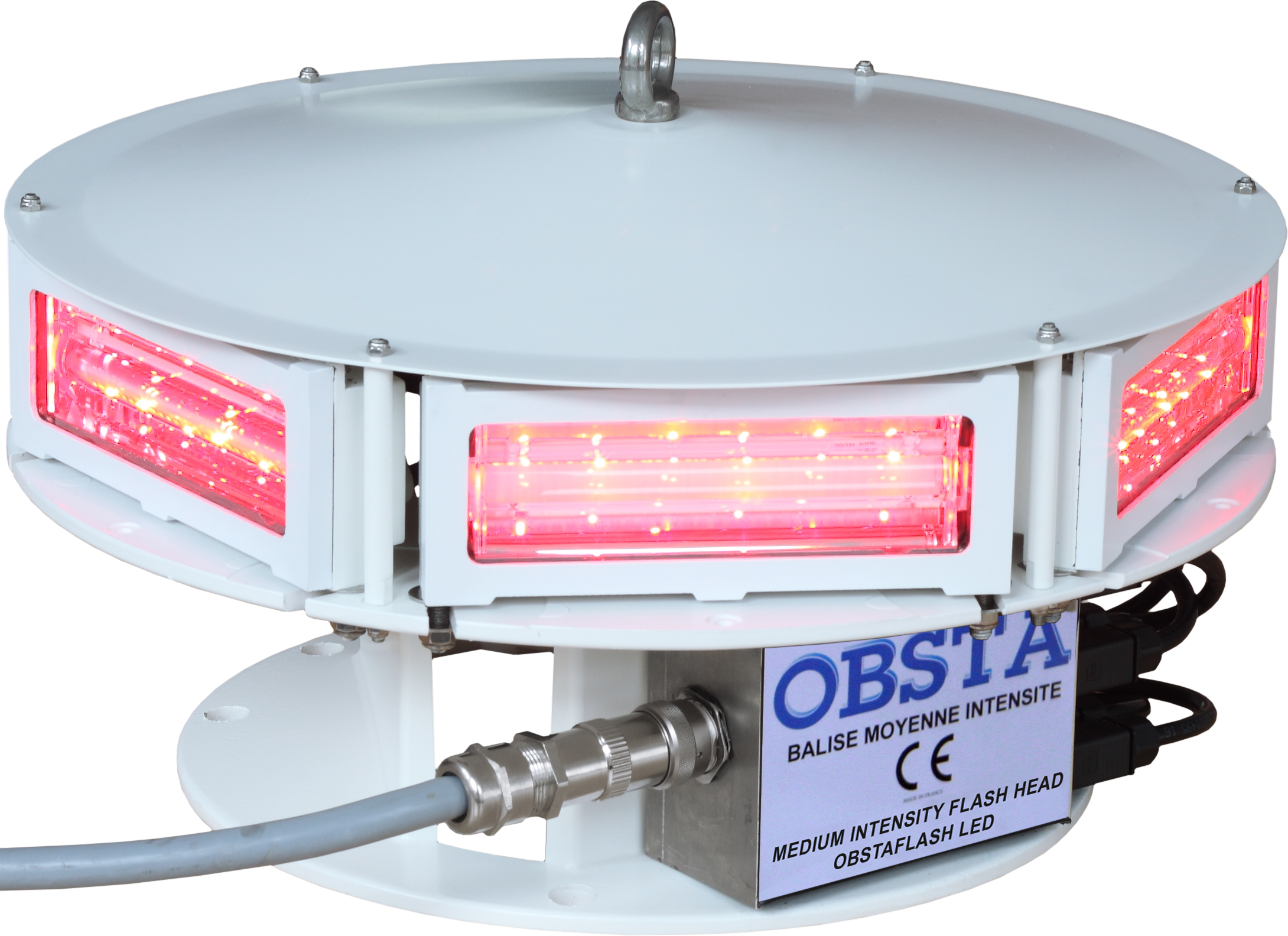 Hindernisbefeuerung